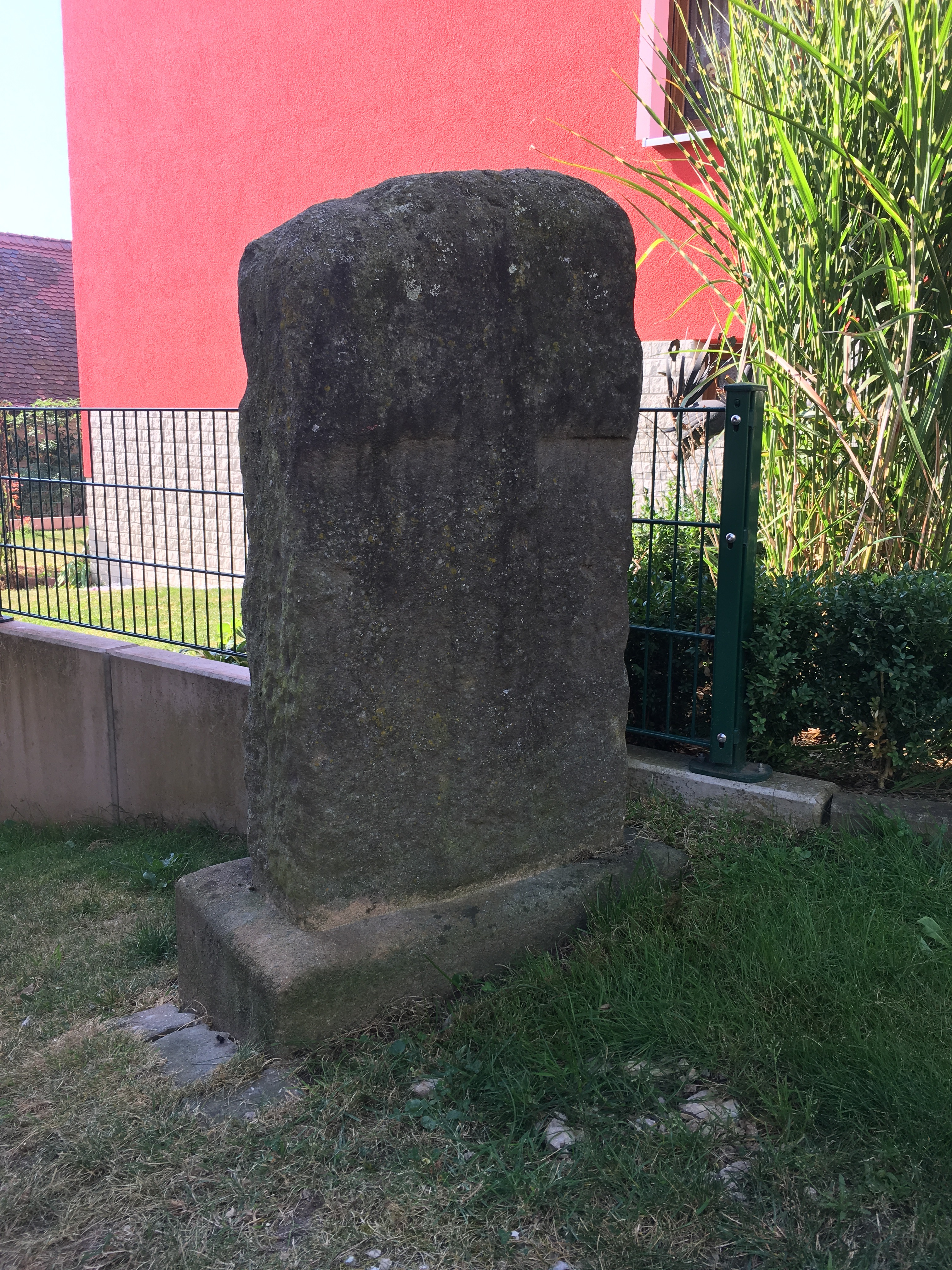 Herrnsdorf Dorfstraße 11